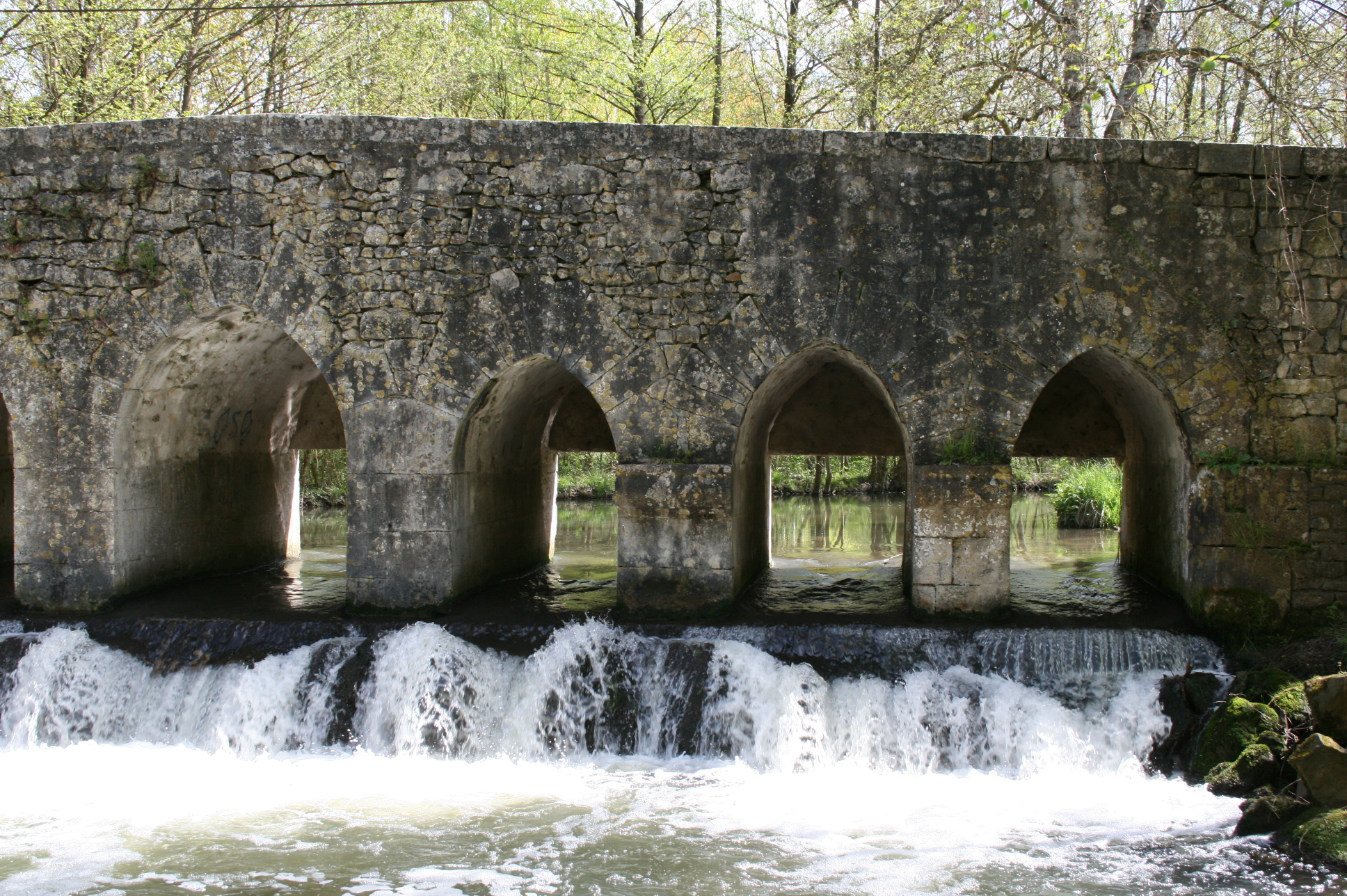 Pont du Gril de Corbelin – Commune de Griselles – Département du Loiret – France – Pont de la fin du XIIème - début du XIIIème siècle